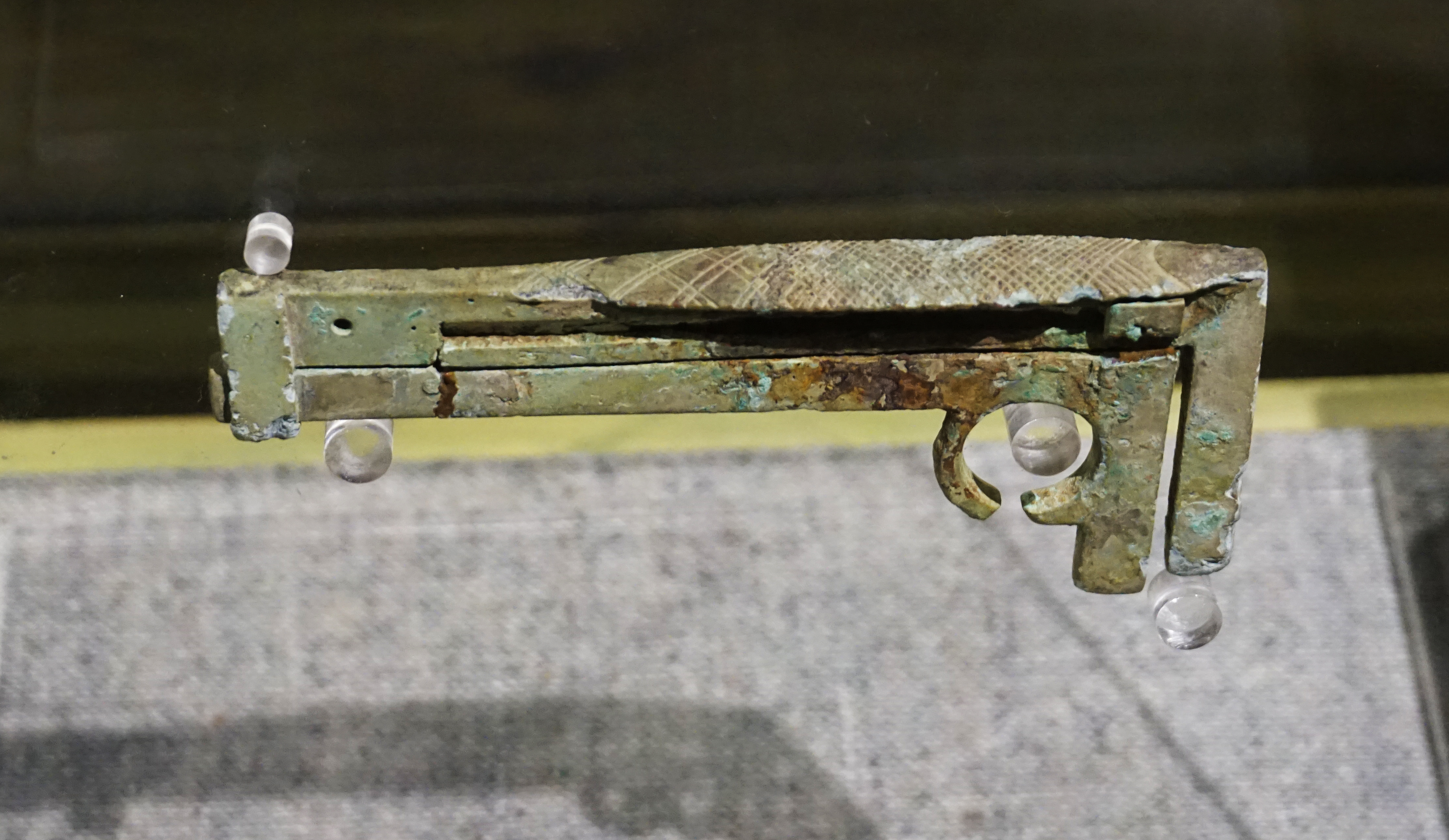 东汉铜卡尺。扬州邗江甘泉乡姚湾村汉墓出土。